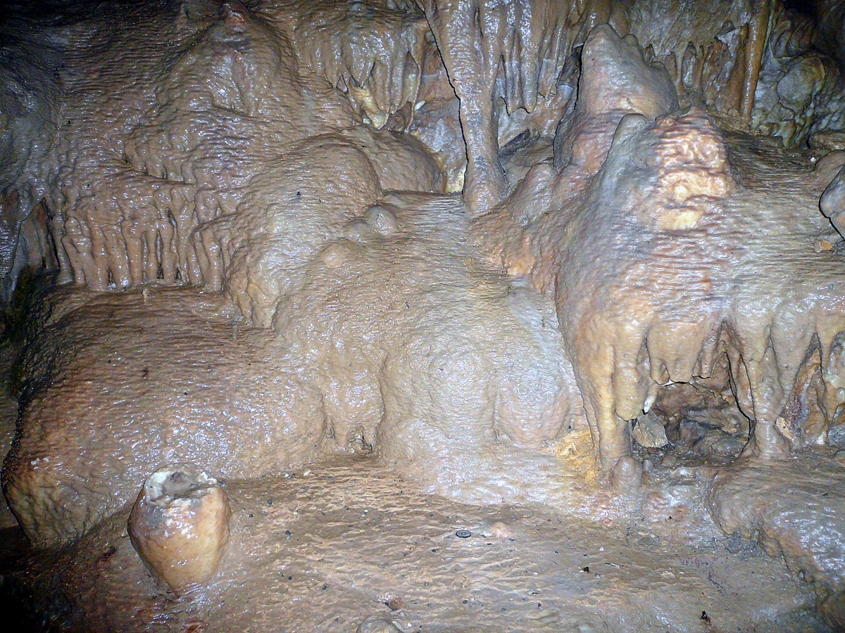 Charlottenhöhle